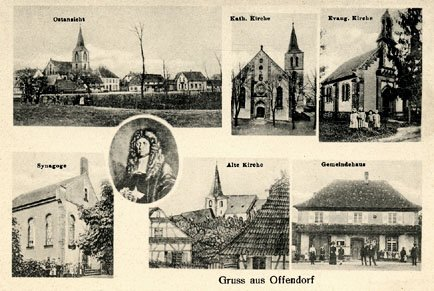 Ansichtskarte von Offendorf im Elsass